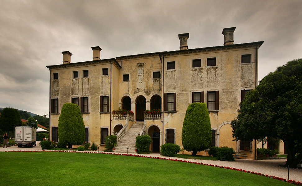 Villa Godi Valmarana, Lonedo di Lugo, Veneto, Italy, Front